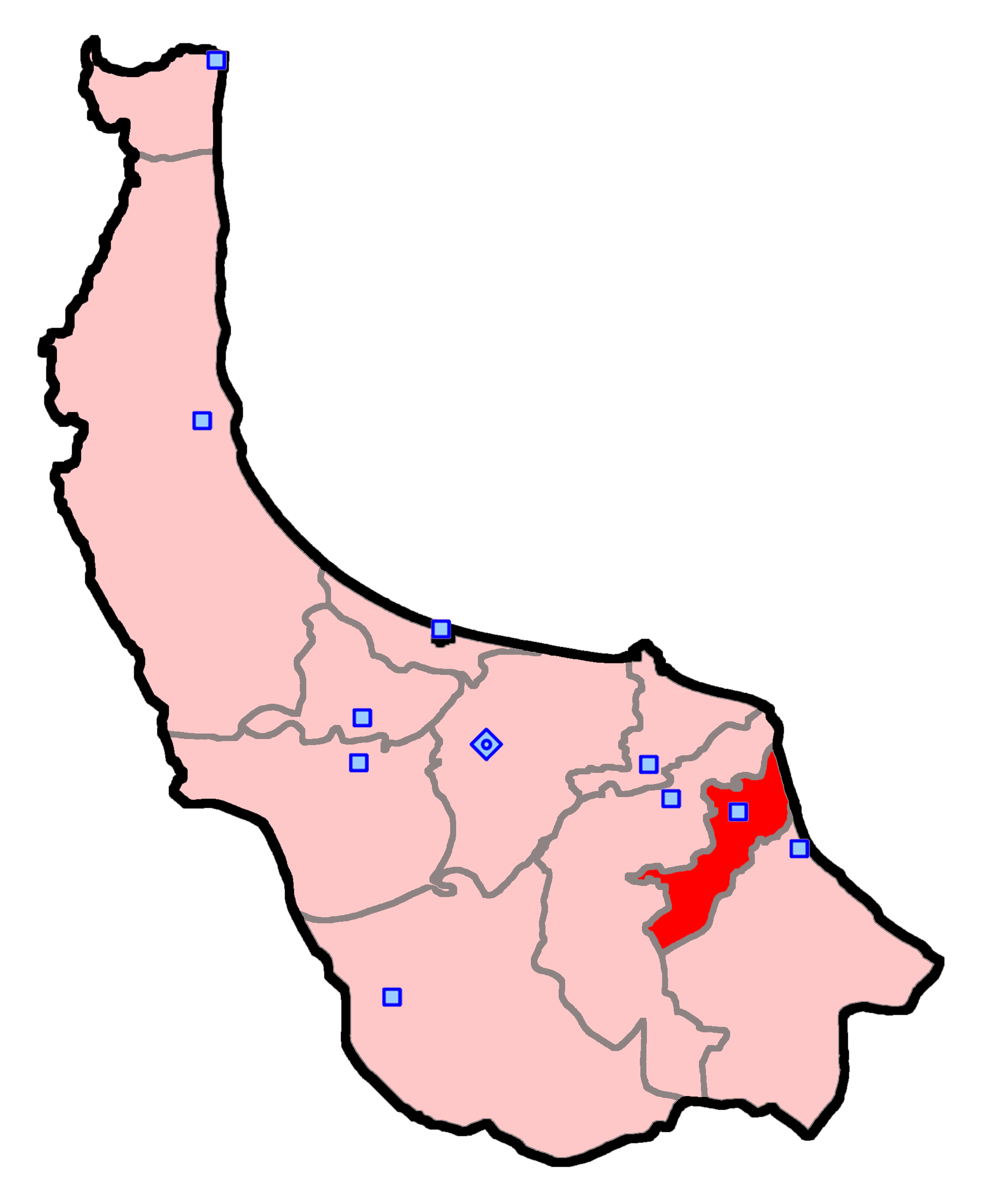 لنگرود برای انتخابات مجلس شورای اسلامی